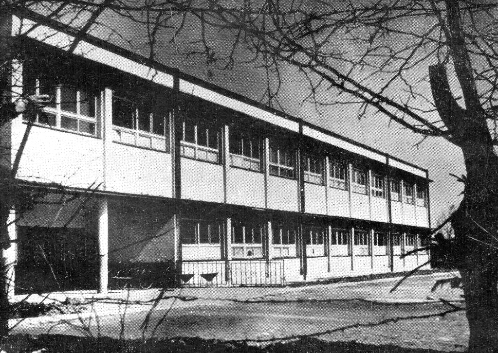 Електромашинскиот училишен центар „Ѓуро Салај“ во 1958 година